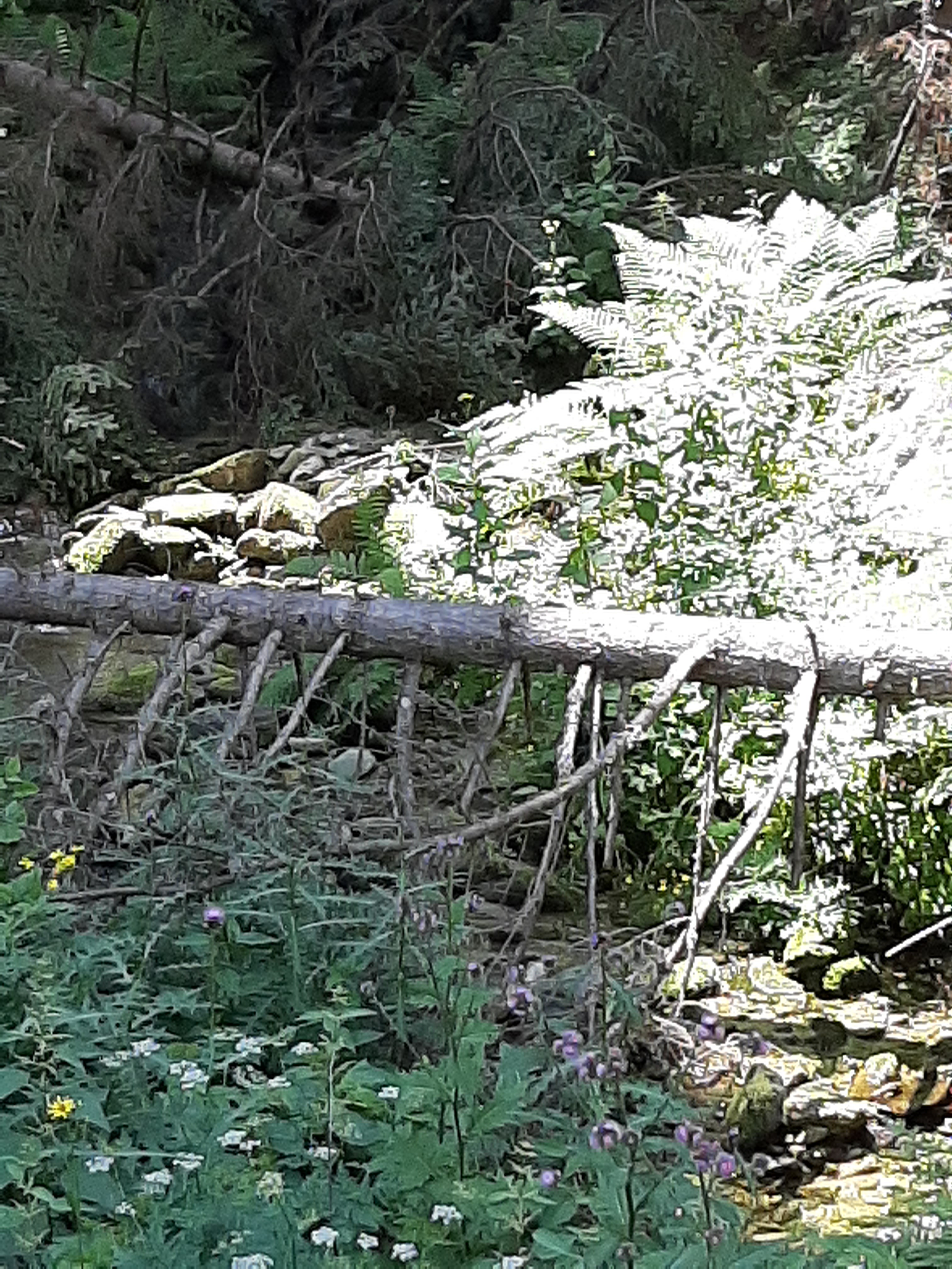 Поглед на Ротинска Река на патот Инфо центар - Врв Пелистер